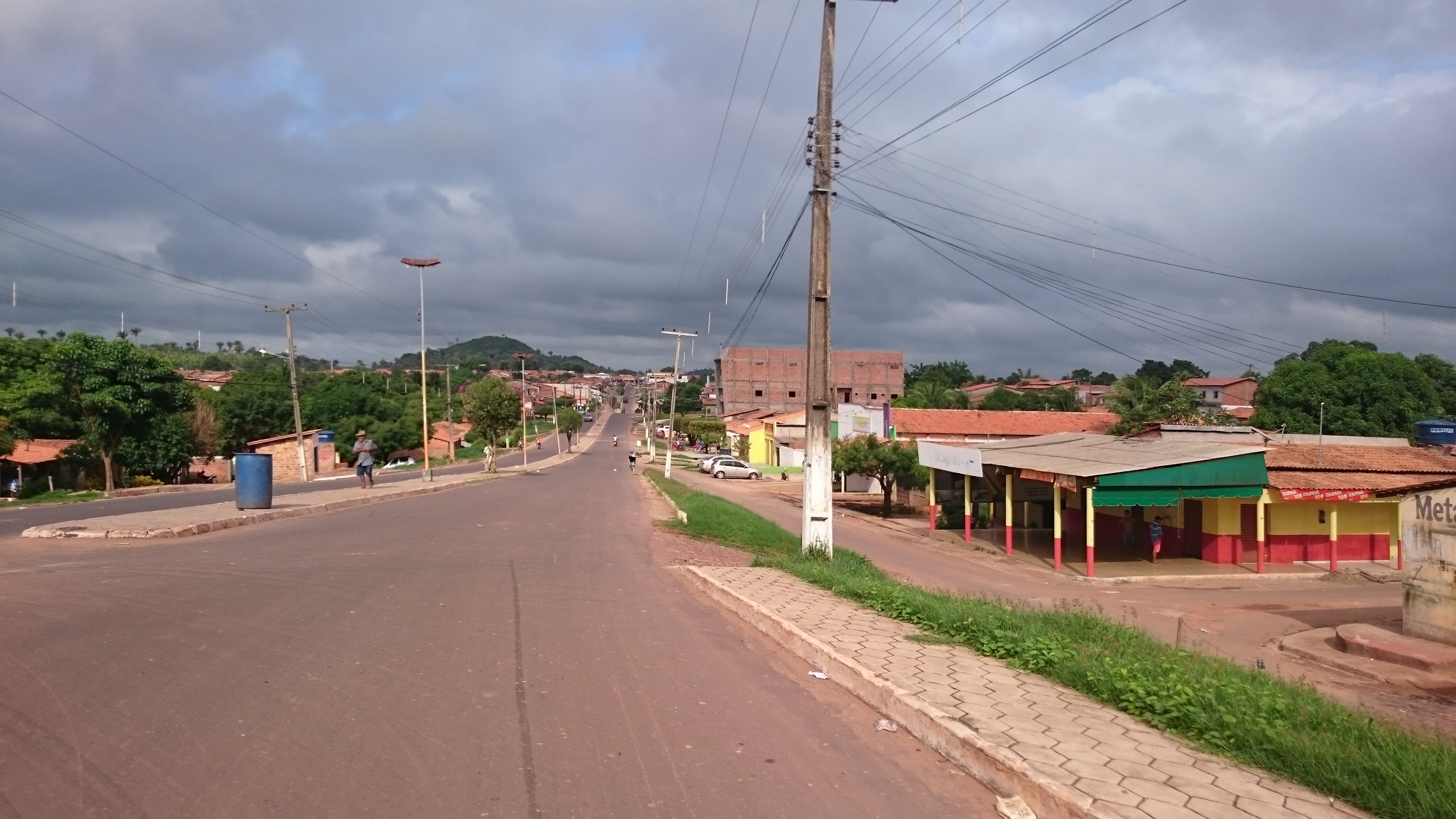 Av. Maura Jorge, bairro Waldir Filho , em Lago da Pedra - MA.